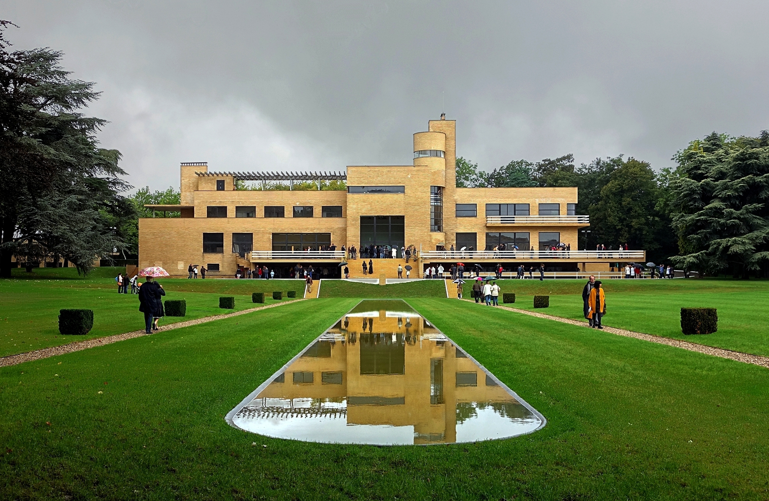 La villa Cavrois à Croix, Nord.